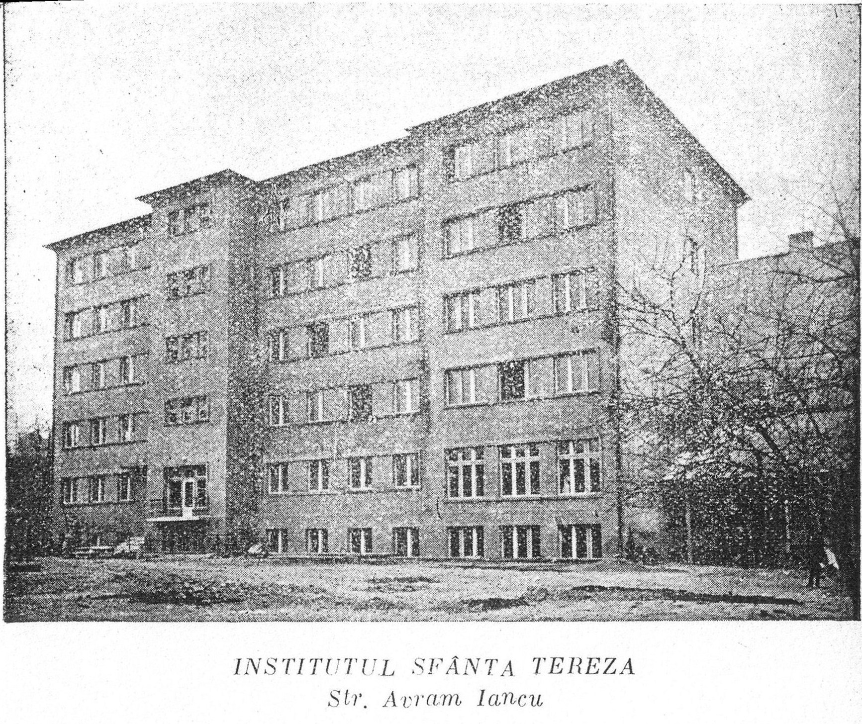 Institutul Sf. Tereza din Cluj, al Congregatiei Surorilor Maicii Domnului.